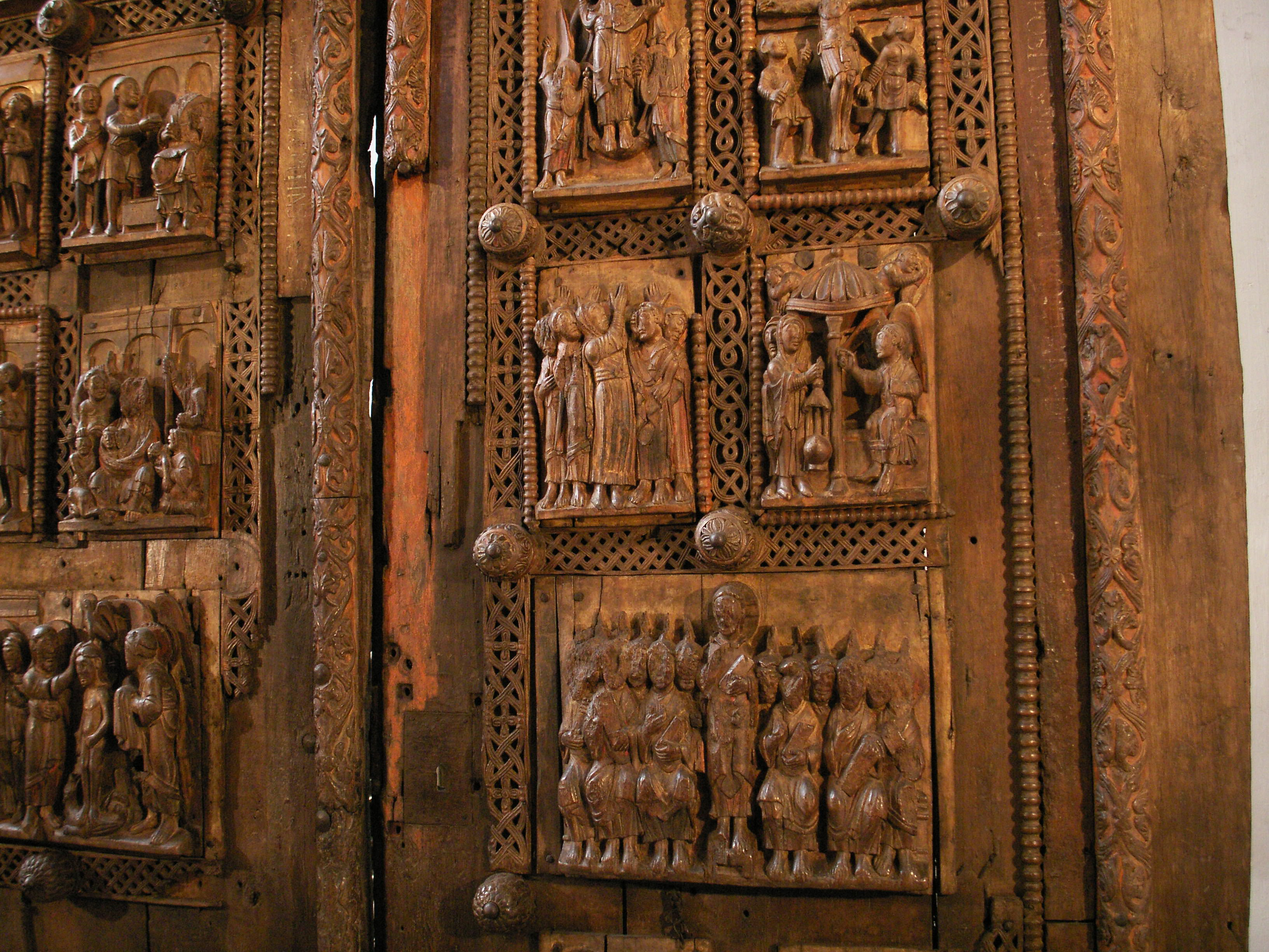 St. Maria im Kapitol, Köln, Romanische Holztüre